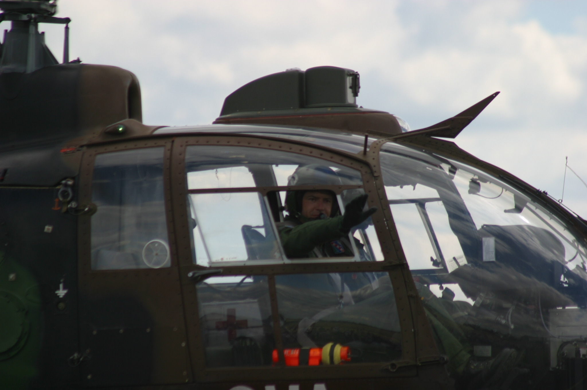 Détail coupe cable sur hélicoptère Gazelle